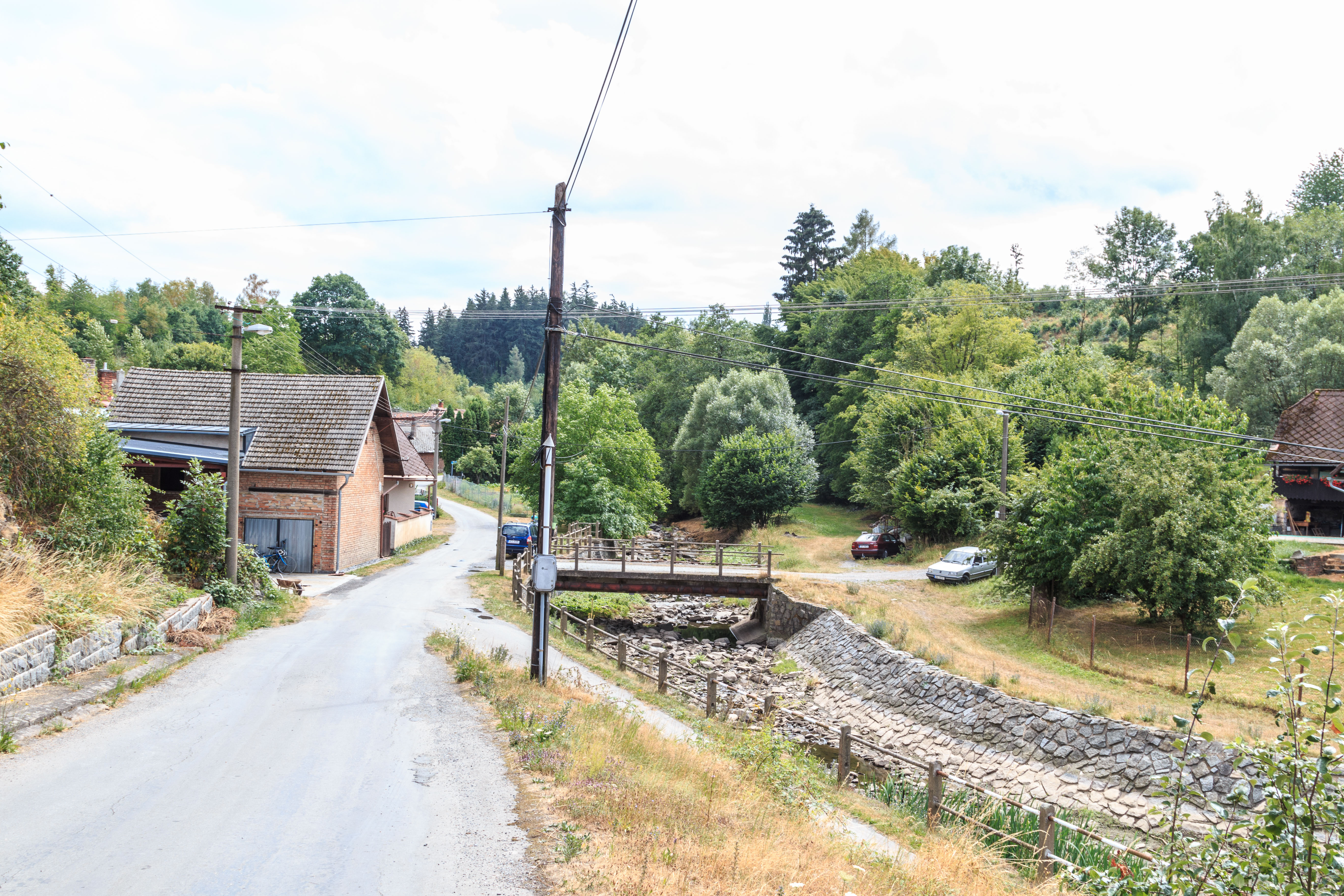 Leštinka skoro vyschlé Žejbro